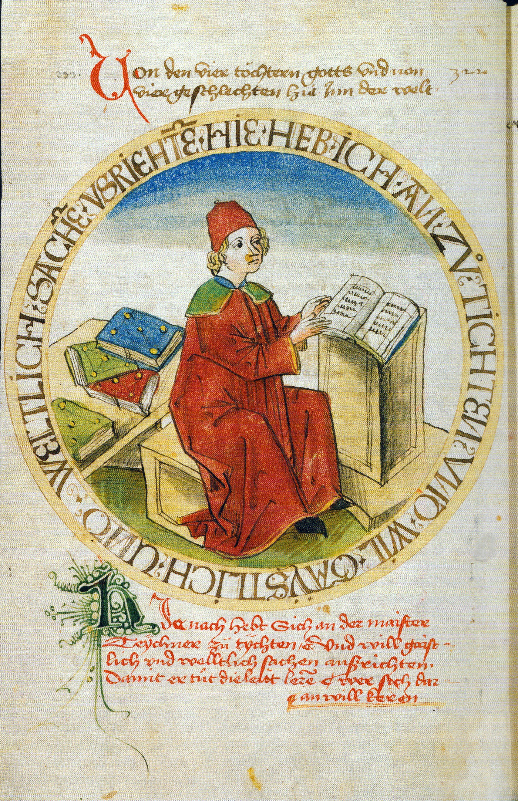 Berlin, Staatsbibliothek , Mgf 564, Bl. 7v